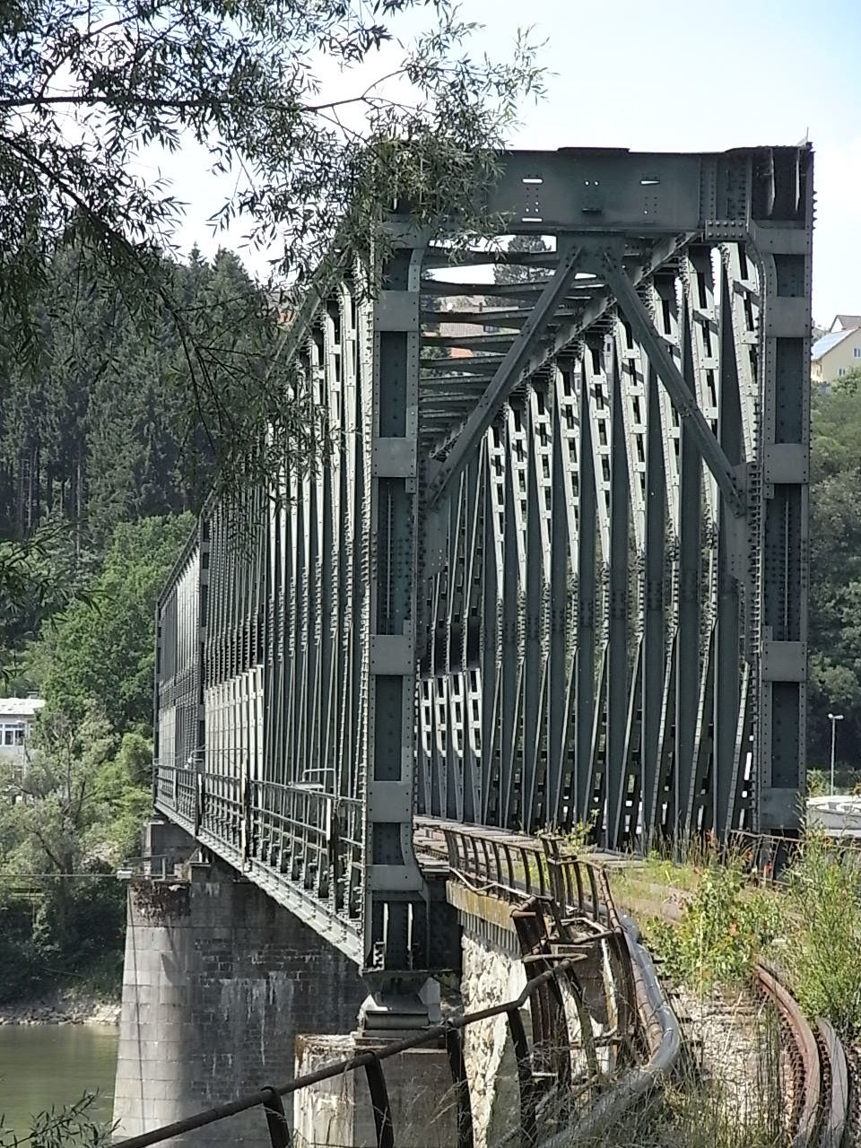 Kräutelsteinbrücke über die Donau, Ansicht vom Südufer